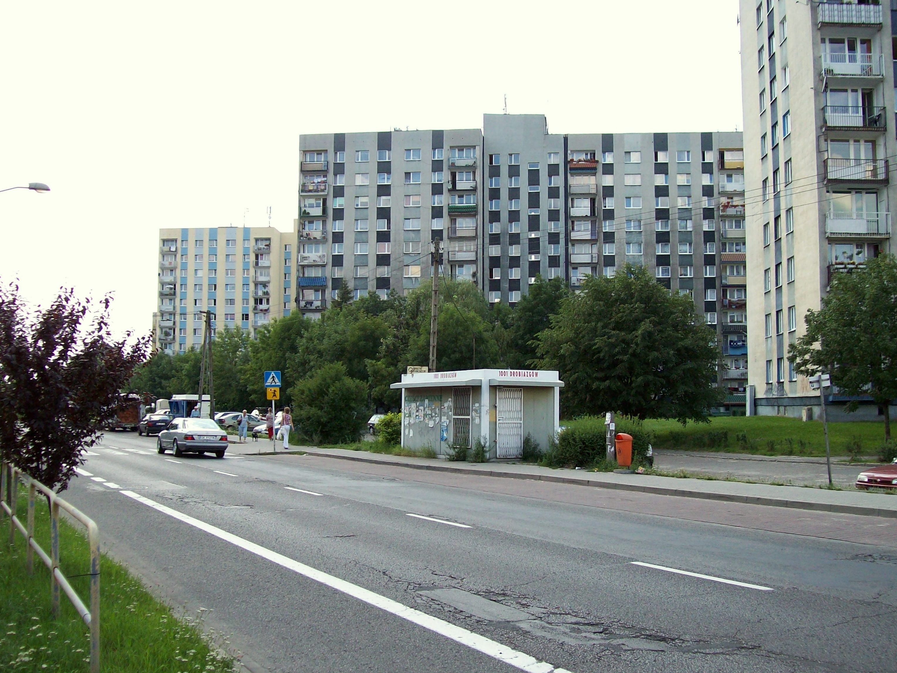 Osiedle "Targowisko" w Katowicach-Piotrowicach